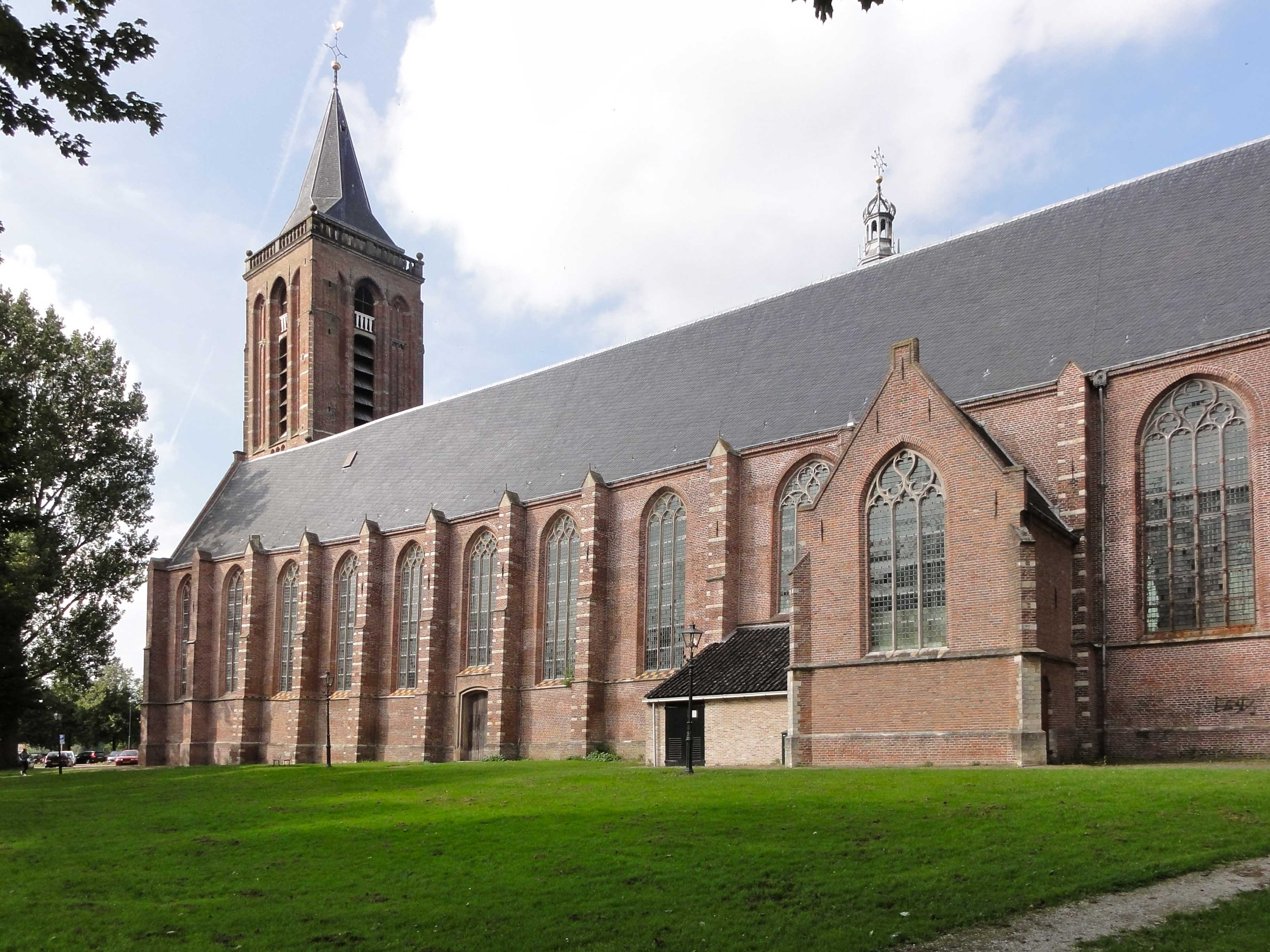 Sint-Nicolaaskerk van Monnickendam